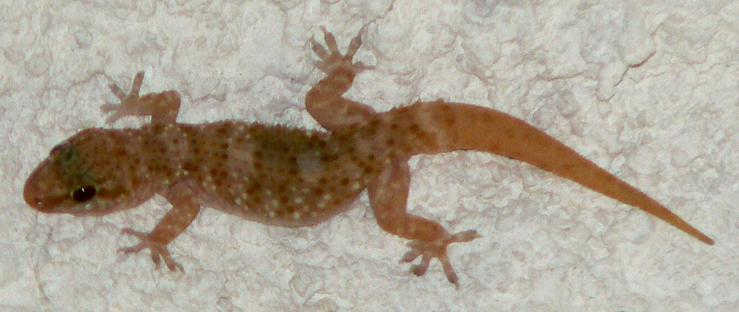 geco mediterraneo figura intera